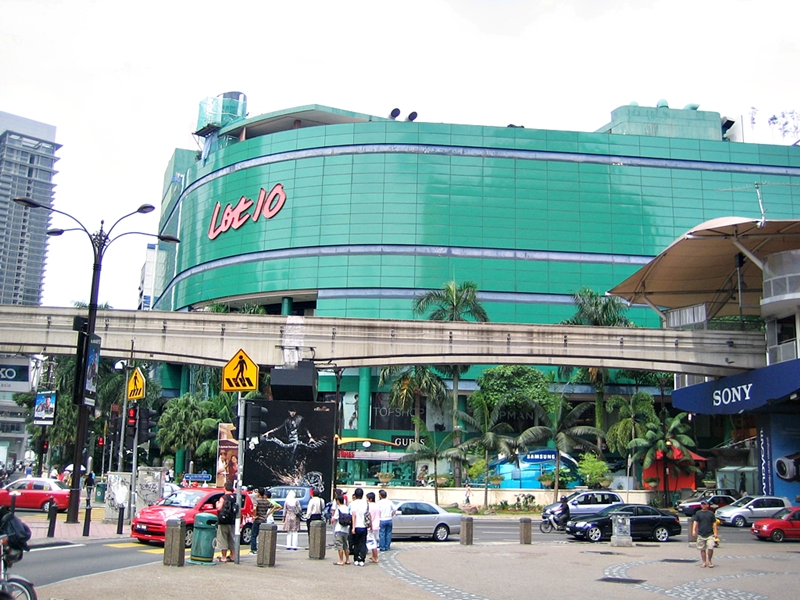 Kuala Lumpur, Malaysia - Bukit Bintang